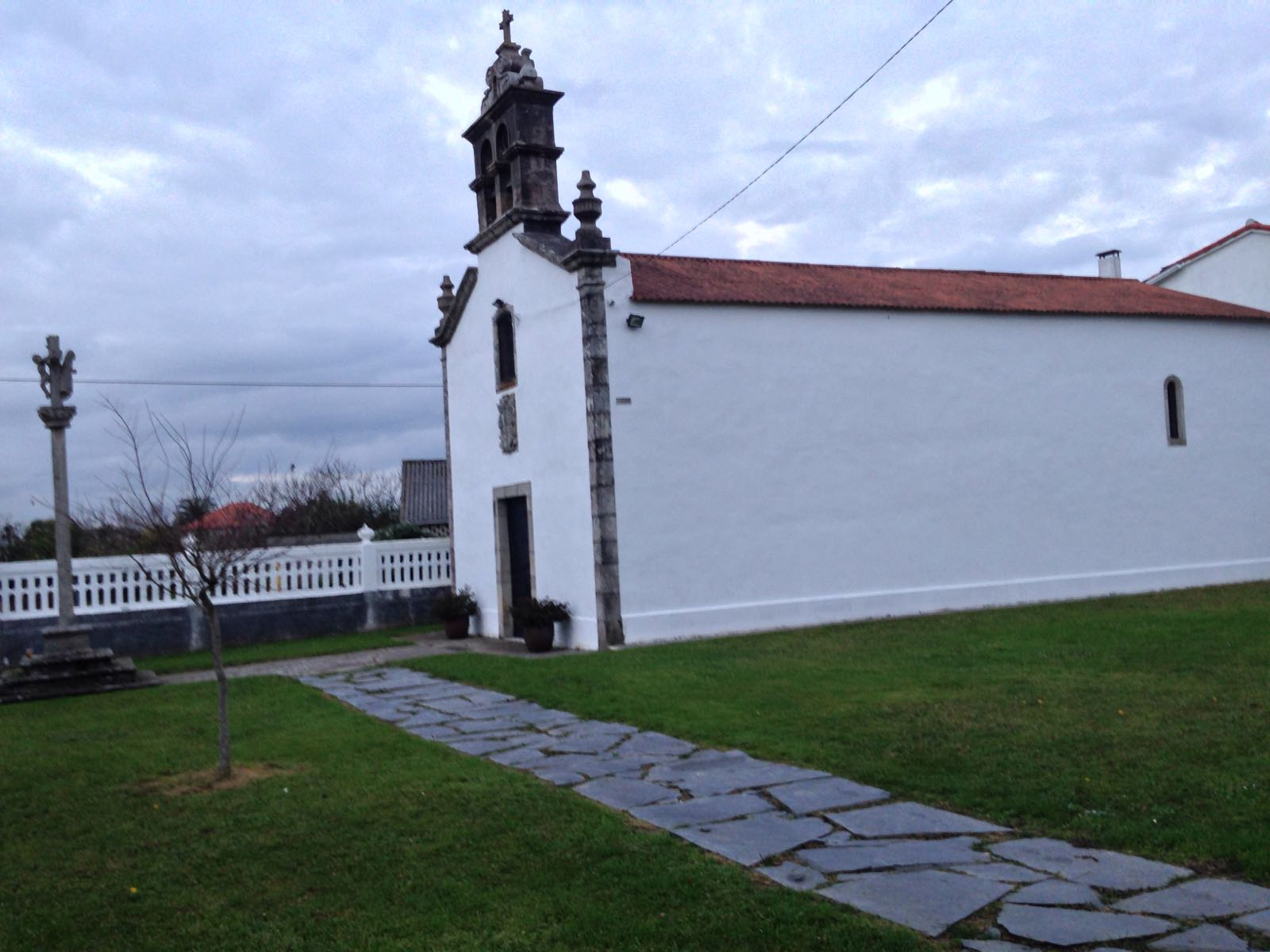 Capela do Castro, Sada